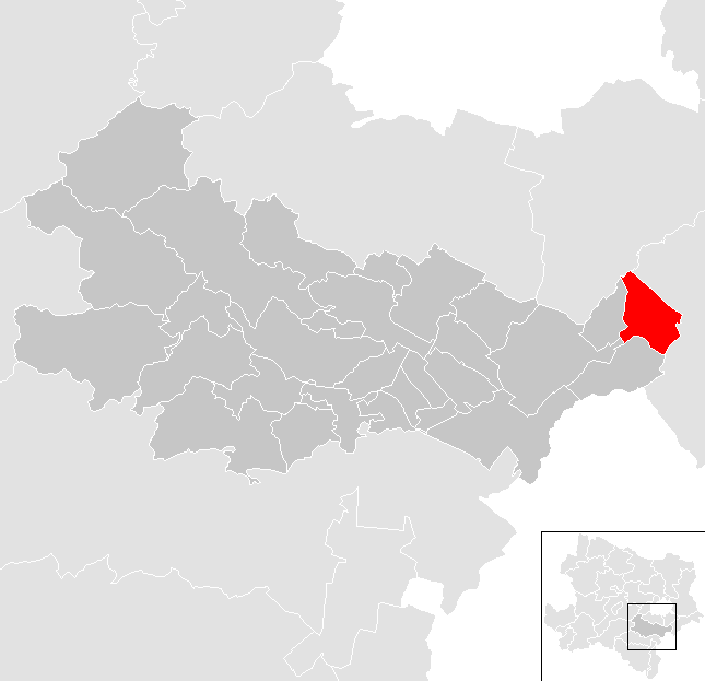 Bezirk Baden